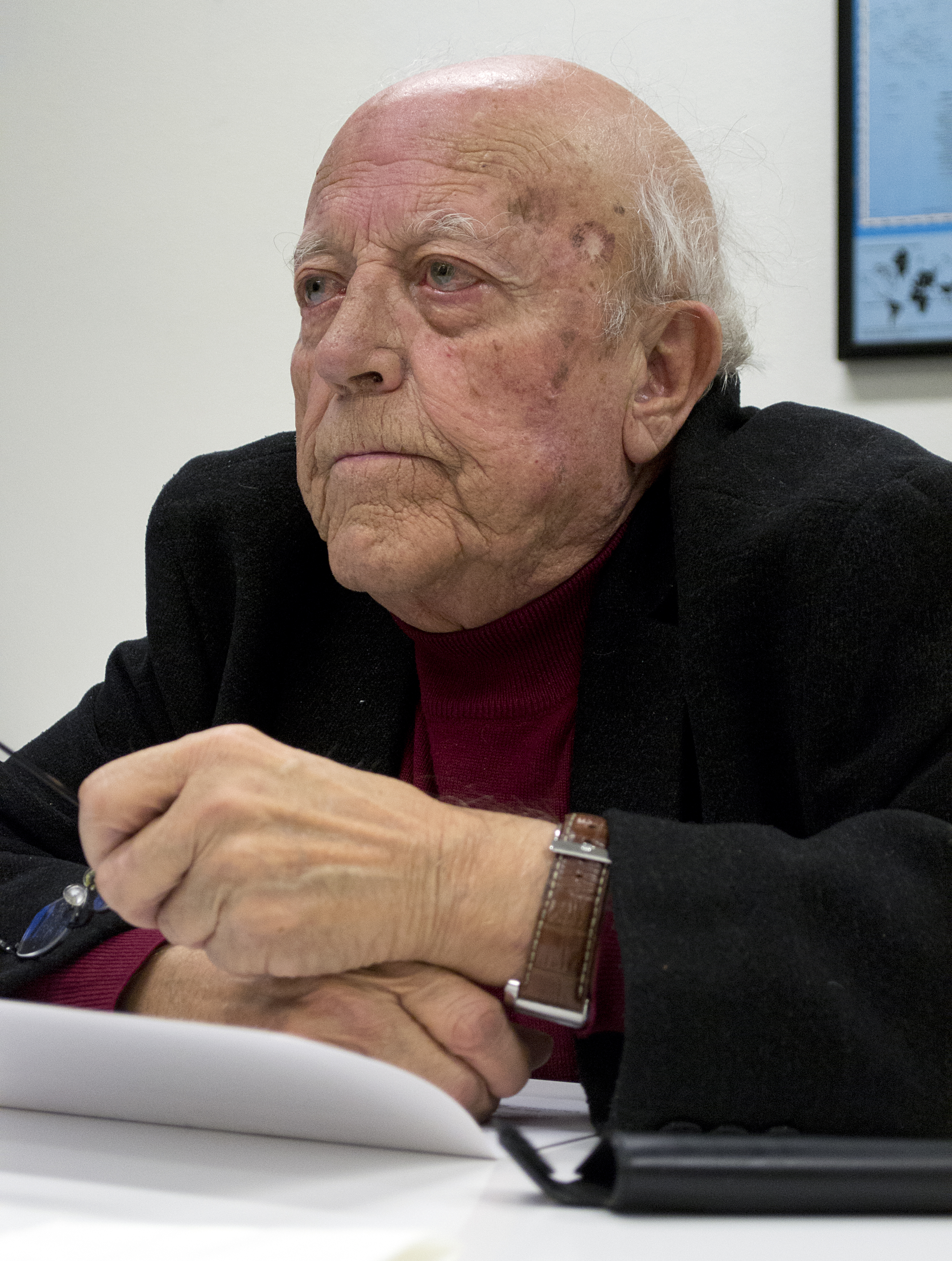 Fotografía: Ángel Cantero // 21-2-2013: Encuentro con el escritor José Jiménez Lozano en el Colegio Mayor "María de Molina". Calle Galera, 2 (Valladolid)